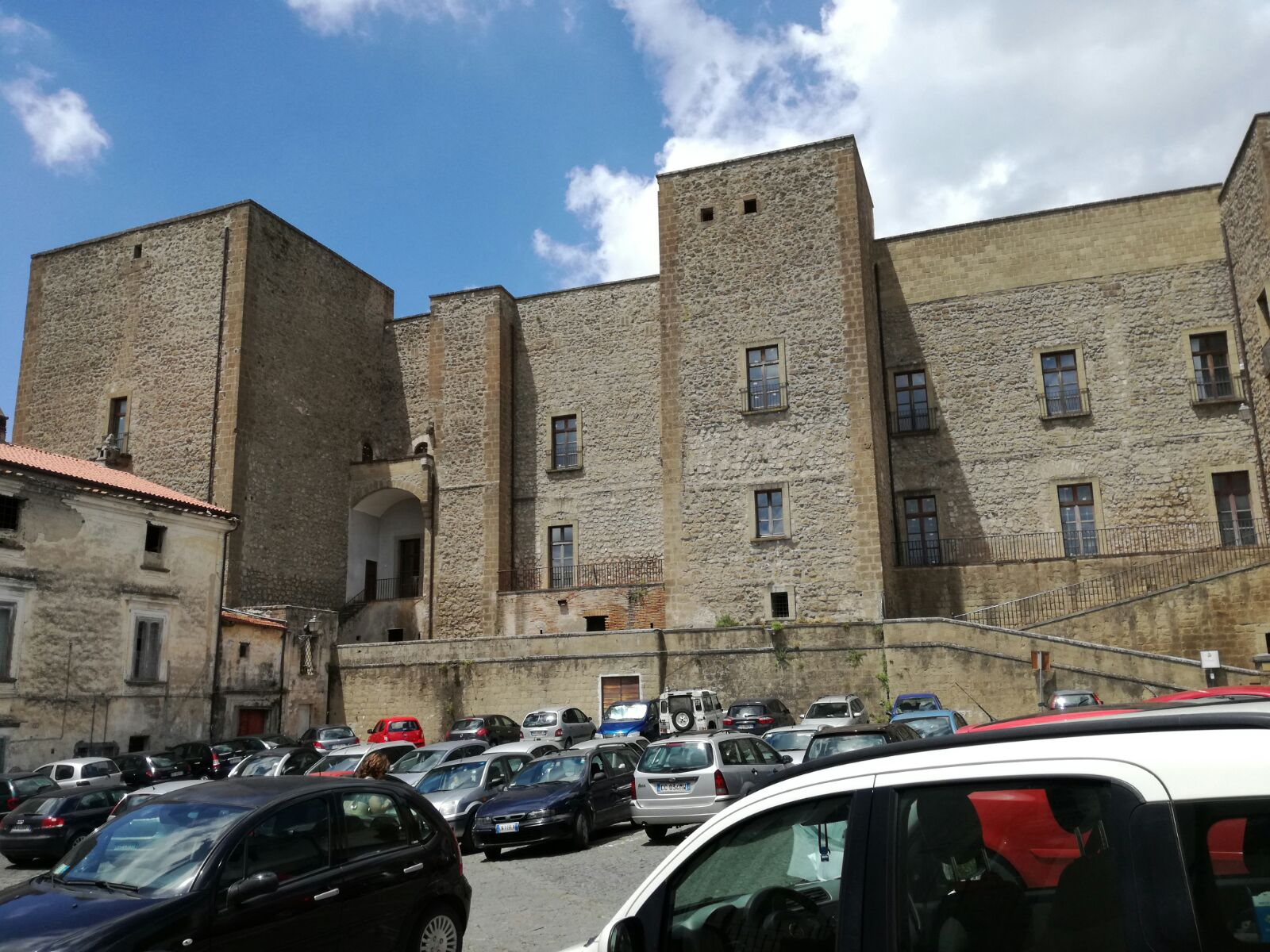 Lato est del castello ducale di Sessa Aurunca (visuale dal municipio)